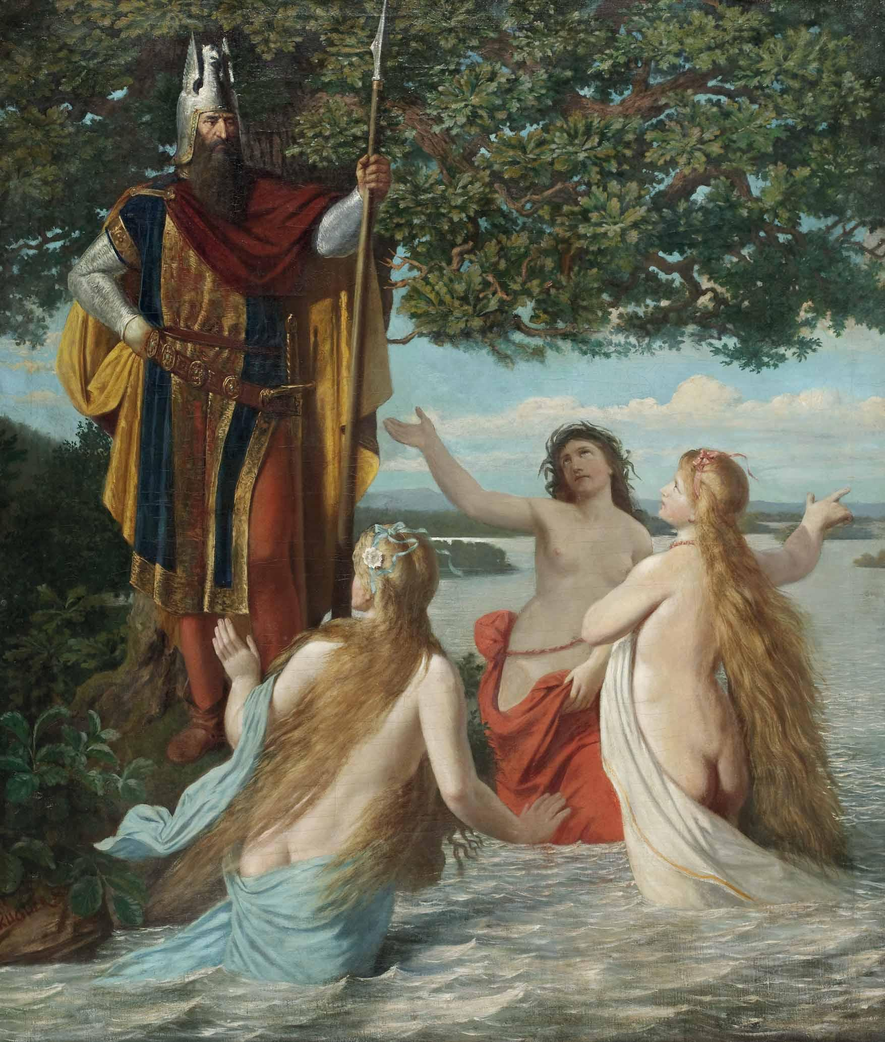 Hagen bei den drei Rheintöchtern